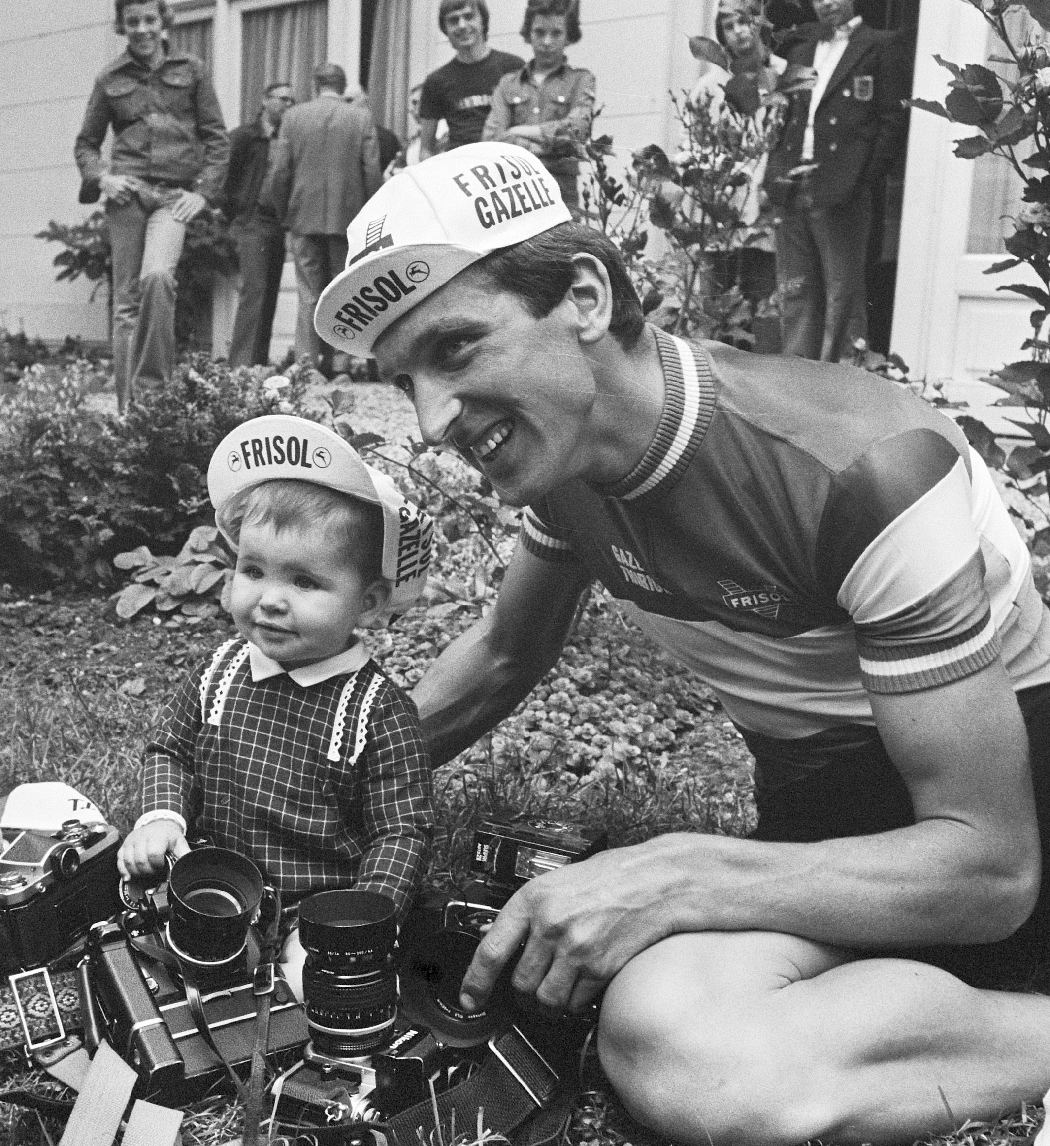 Presentatie Nederlandse wielerploegen Raleigh en Frisol, deelnemen aan Tour de France ; Fedor den Hertog met dochter